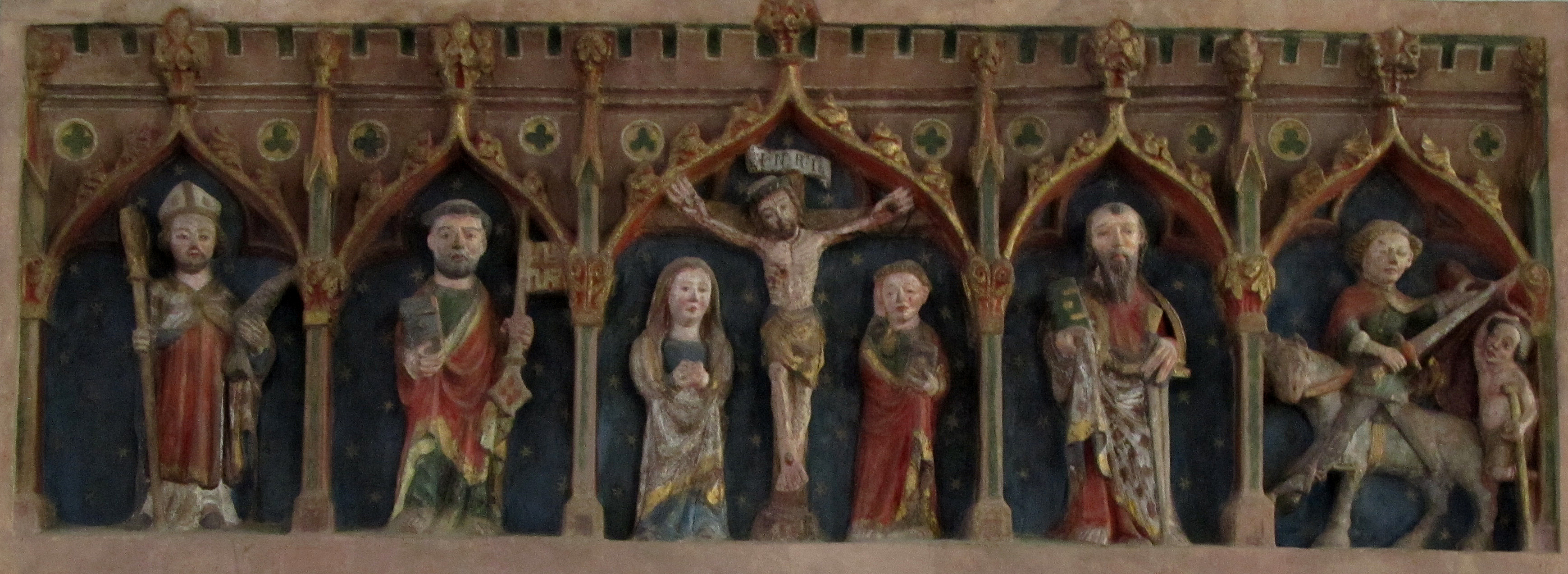 Steinernes Altarretabel (geschaffen um 1430) in der katholischen Pfarrkirche St. Martin, Medelsheim, Saarland